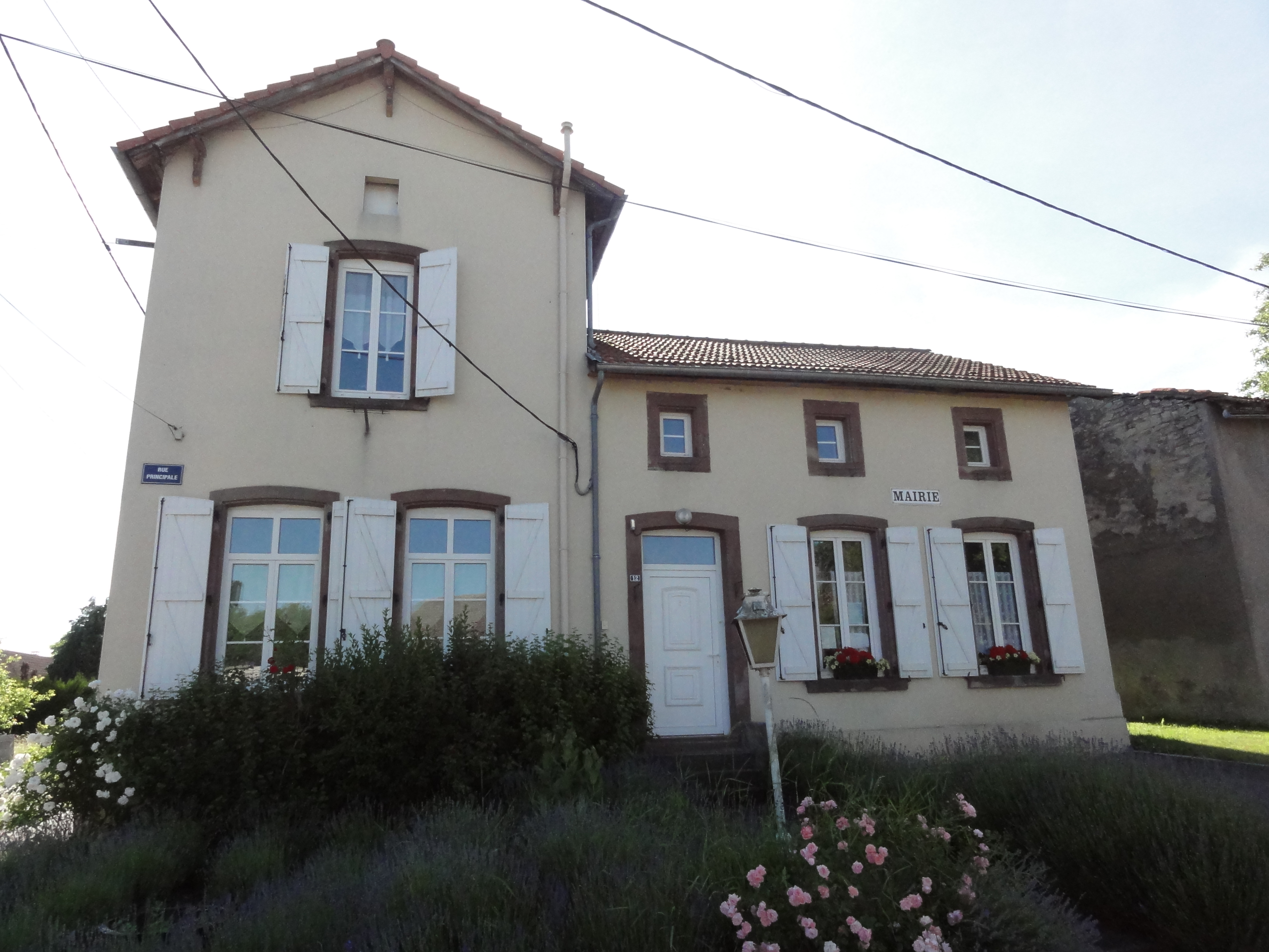 Rorbach-lès-Dieuze (Moselle) mairie